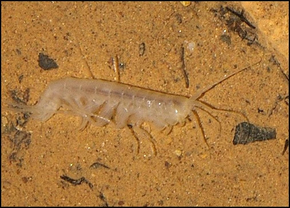 Niphargus, vue latérale